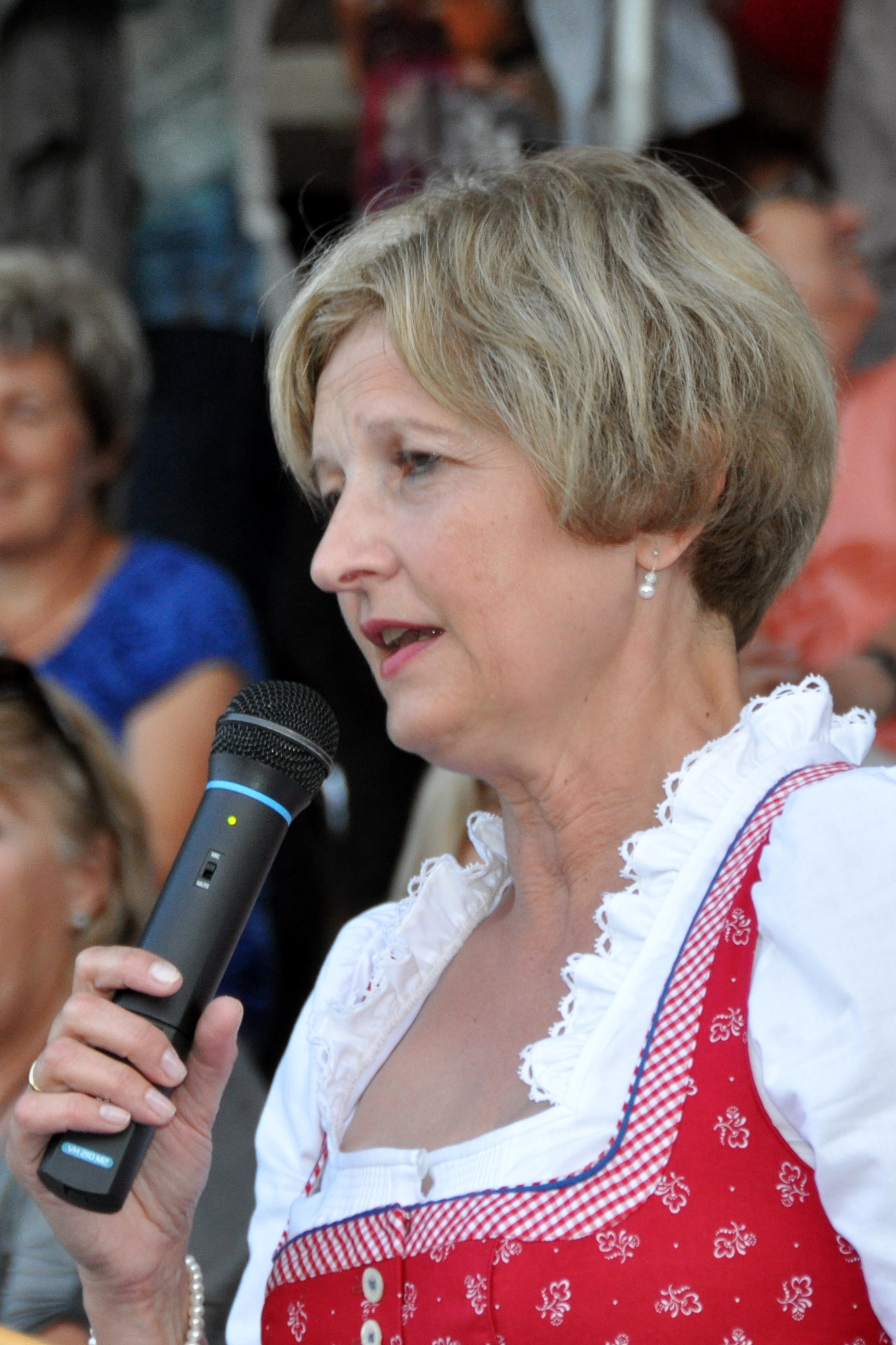 Eva Maria Gattringer beim Bezirksmusikfest 2014 in Walding